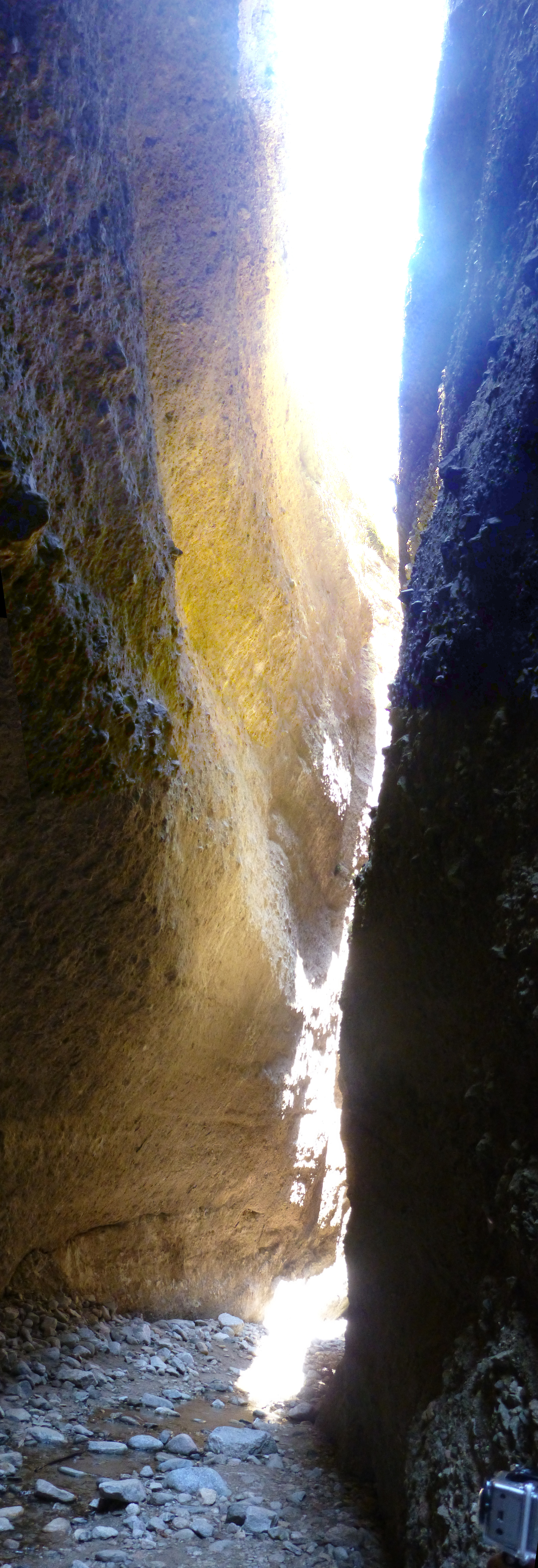 Valli cupe (Sersale - CZ) 2